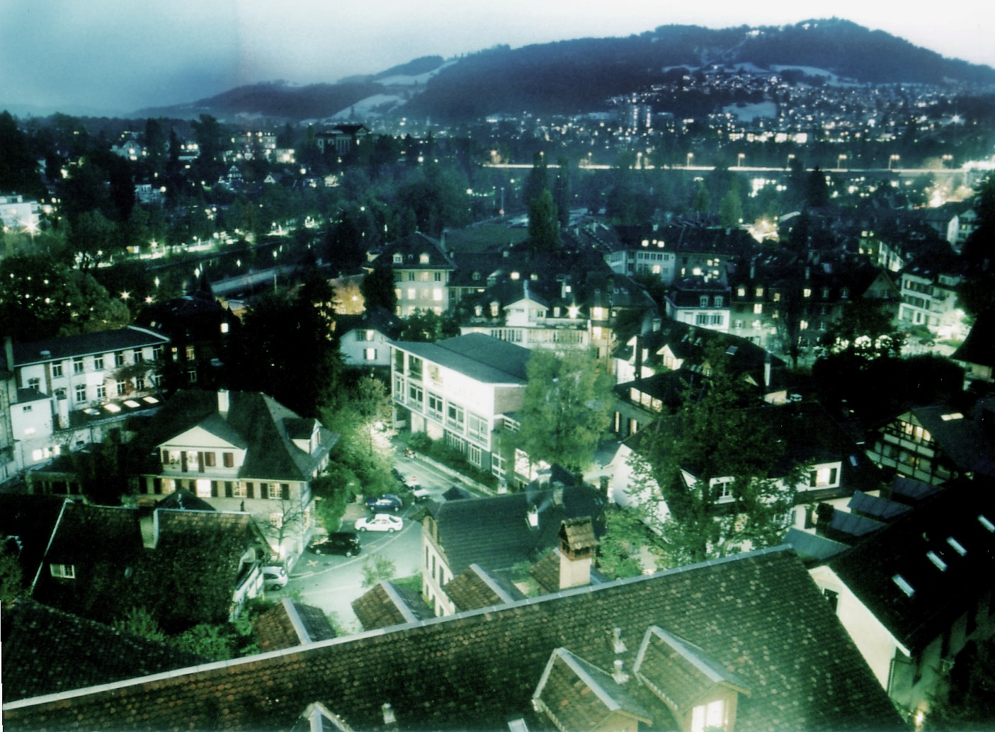 Das Berner Mattequartier bei Dämmmerung